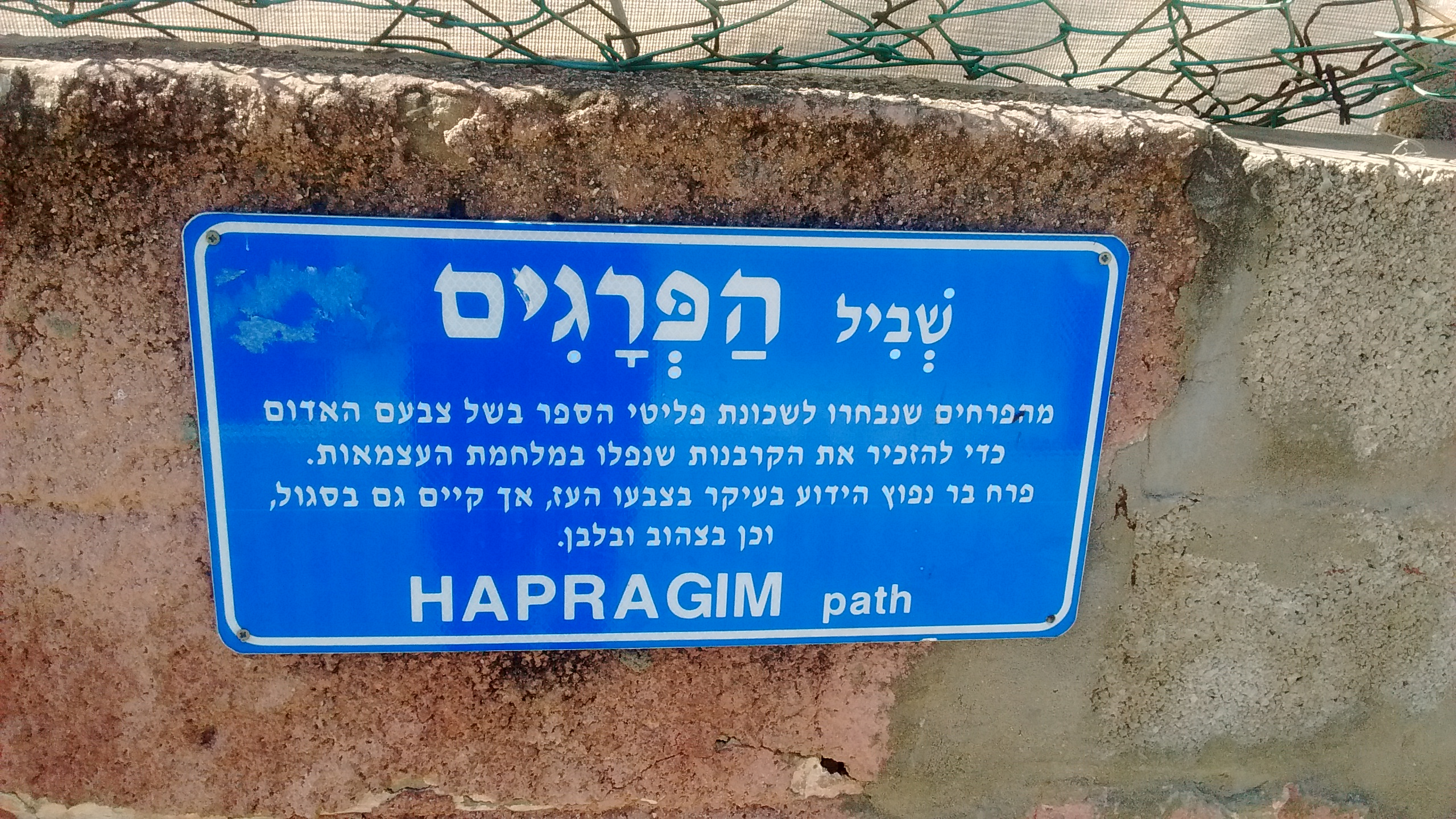 שלט רחוב הפרגים ברמת ישראל (שכונת פליטי הספר)